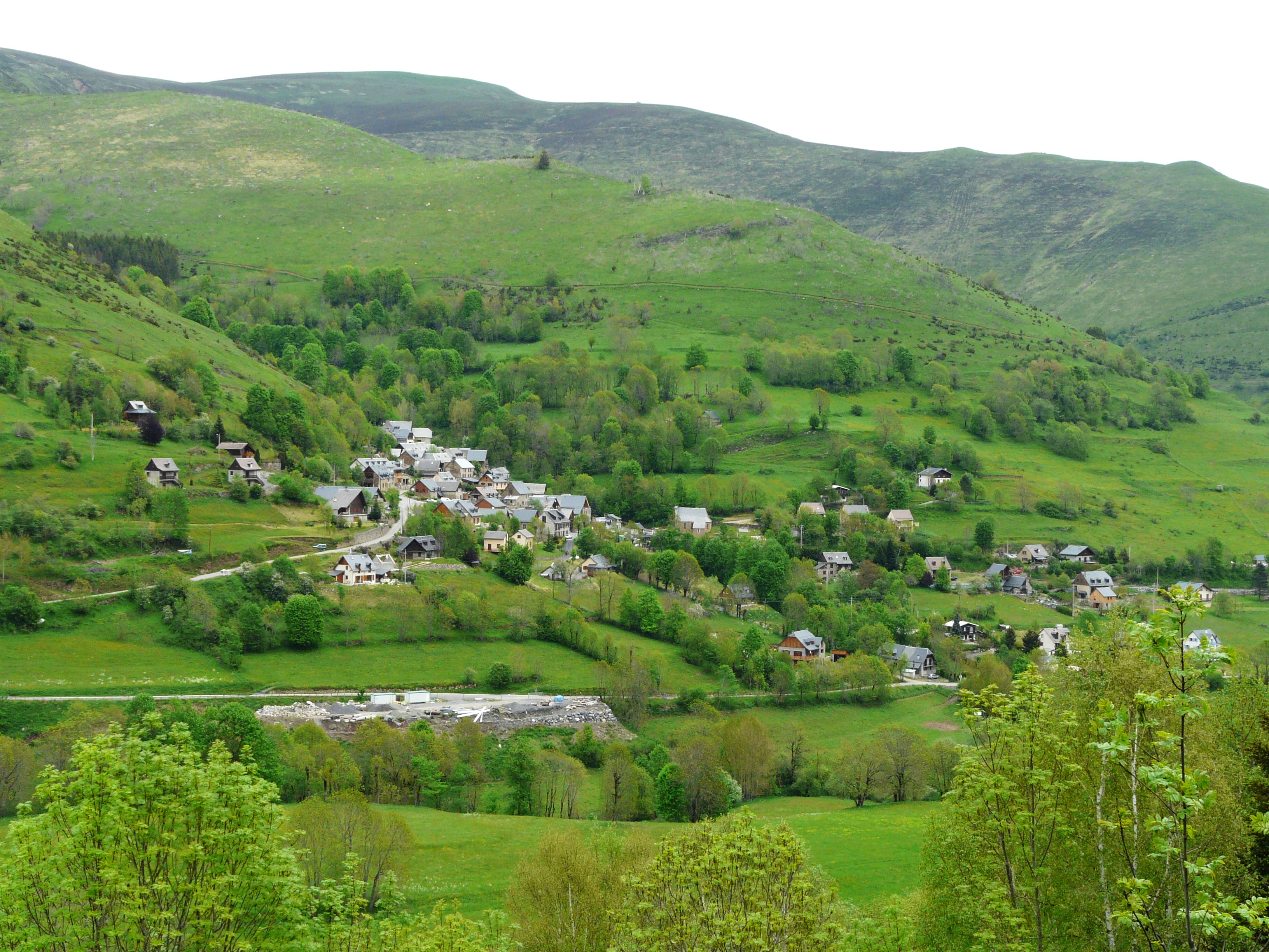 Le village de Poubeau, Haute-Garonne, France. Vue prise depuis la route départementale 618.